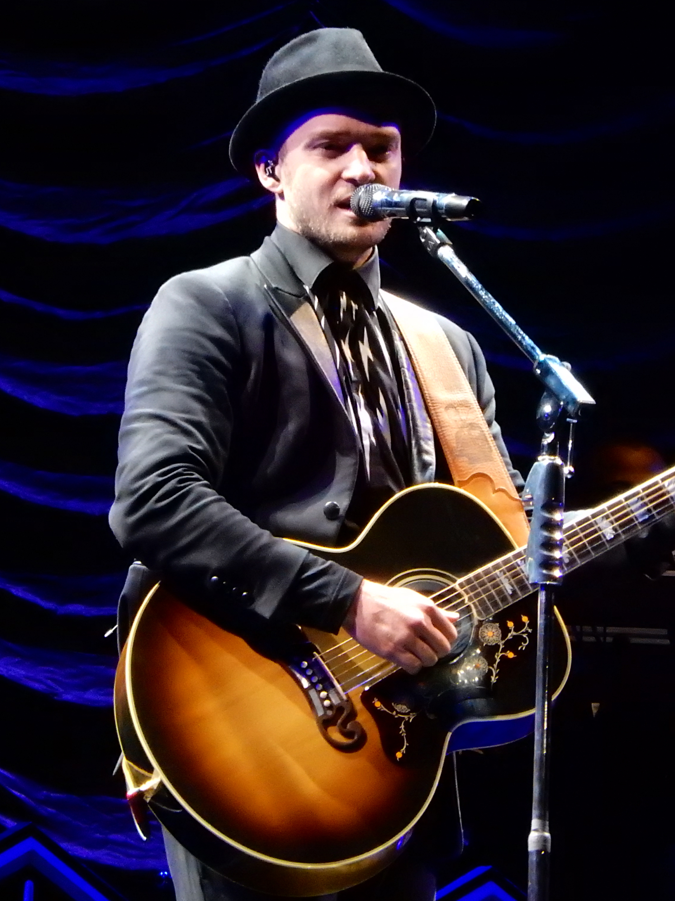 El cantante Justin Timberlake durante su presentación en el V Festival como parte de su gira The 20/20 Experience World Tour. Hylands Park, Chelmsford, Reino Unido.